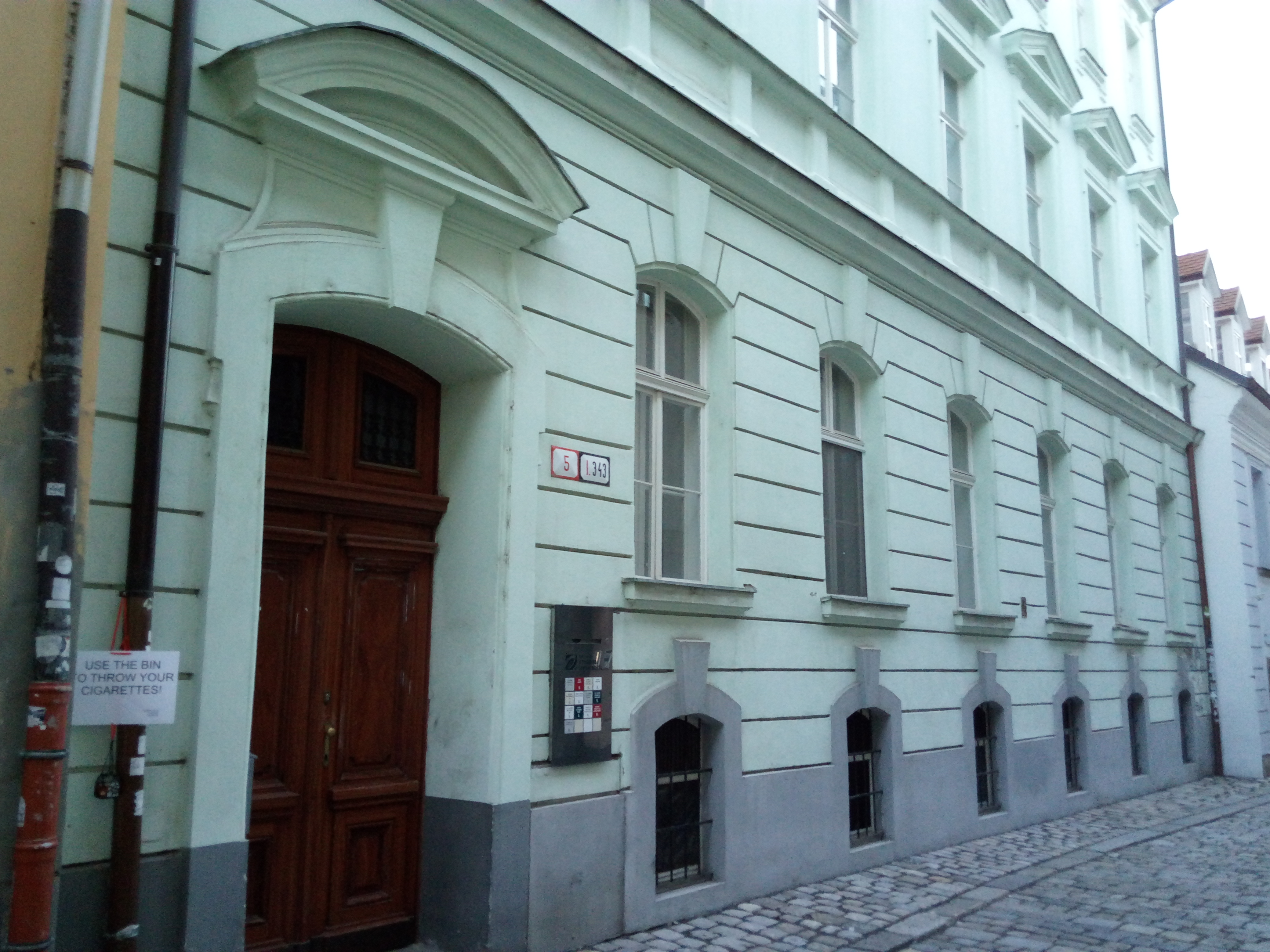 Baštová 5, Staré Mesto, Bratislava